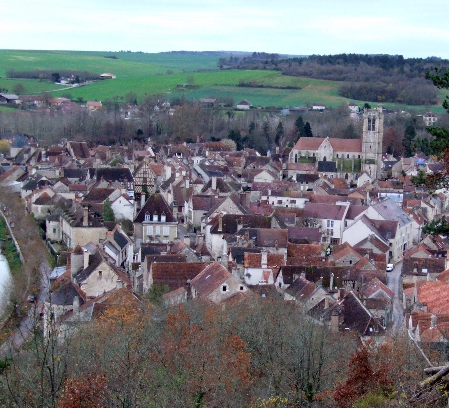 Vue panoramique de Noyers-sur-Serein à partir la montagne Saint-Georges,Noyers-sur-Serein, Yonne, Bourgogne, FRANCE